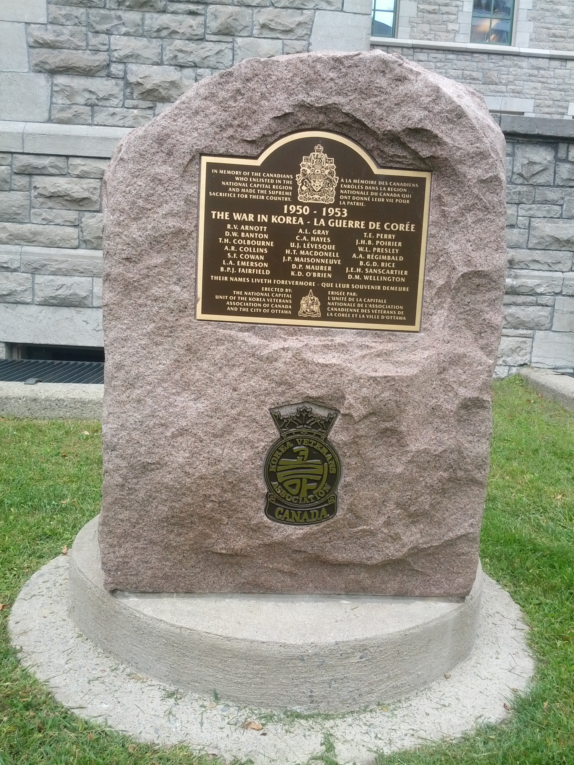 Placa perto da prefeitura de Ottawa.